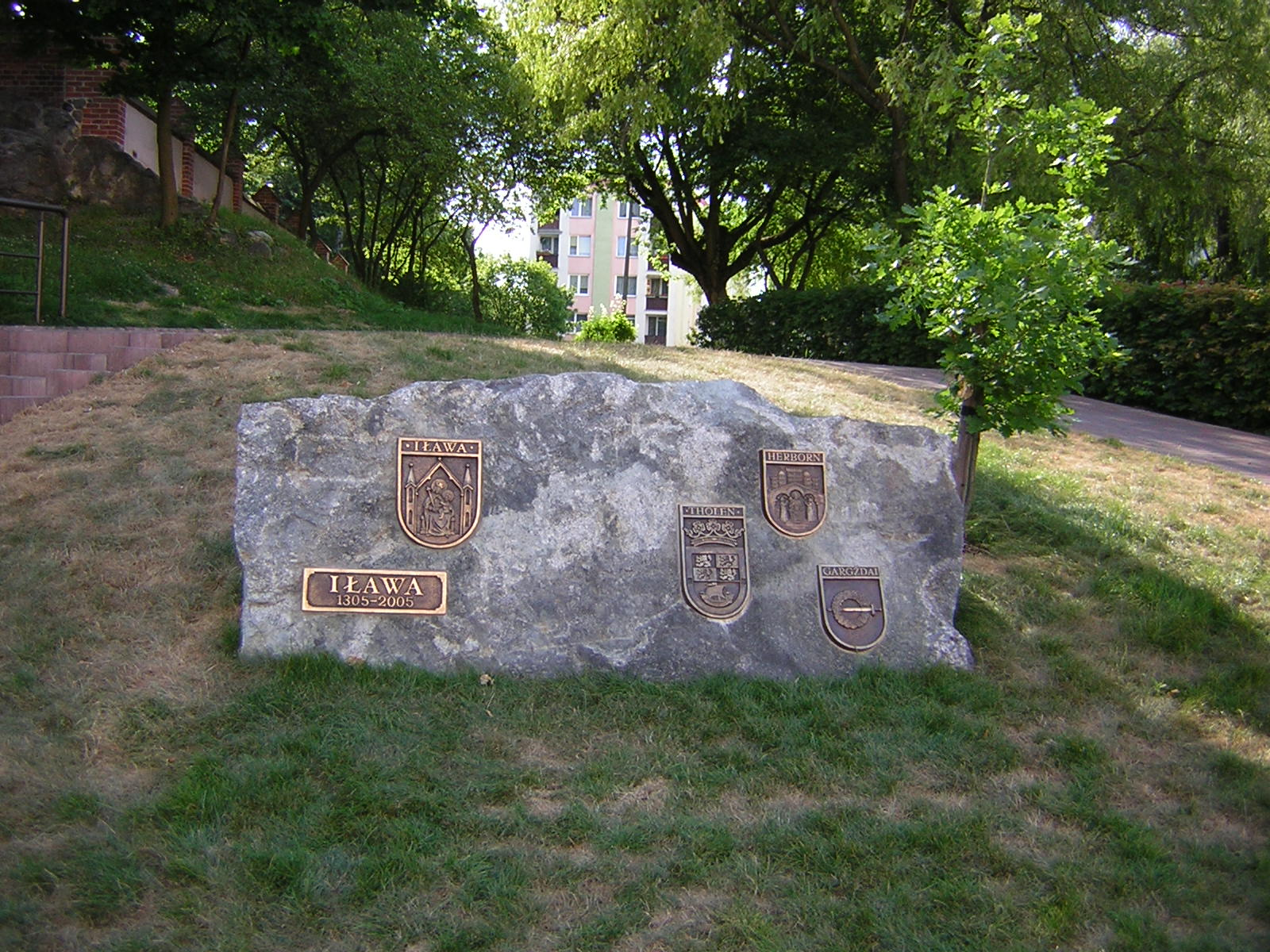 Kamień pamiątkowy z okazji 700-lecia Iławy